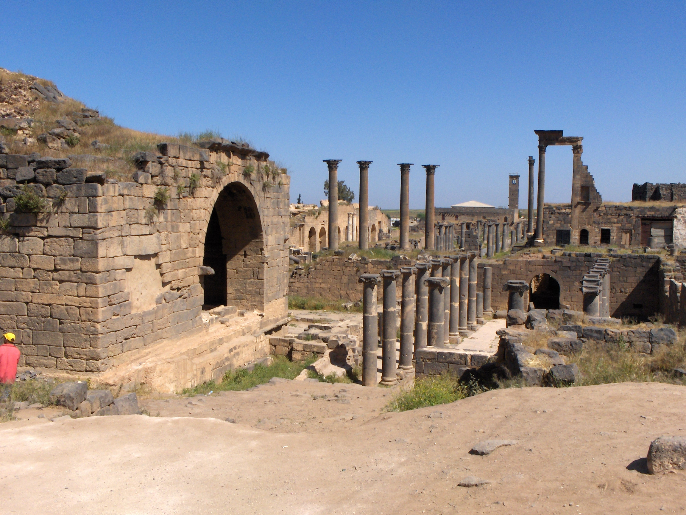 Veduta del sito archeologico di Bosra, Siria